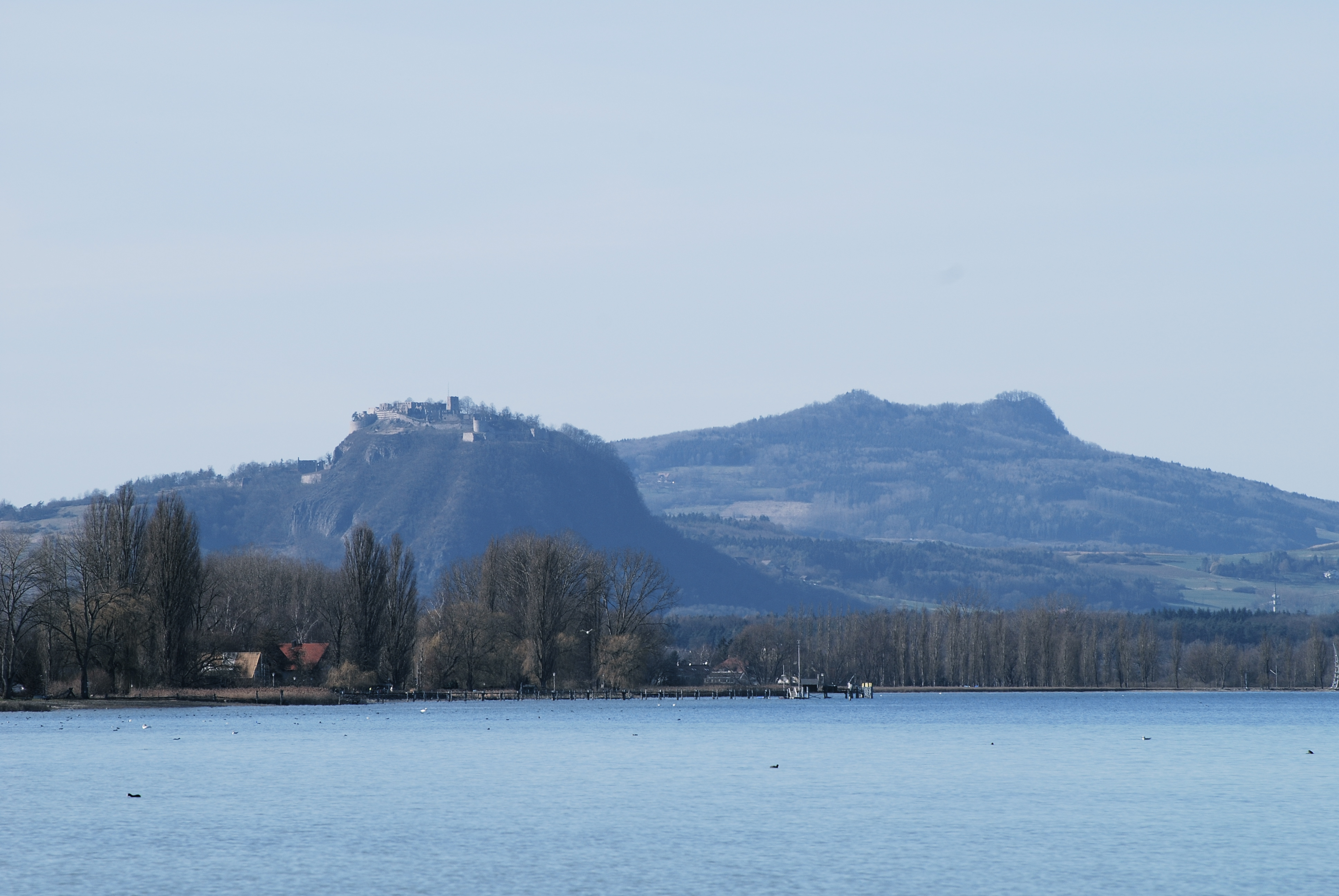 Hohentwiel